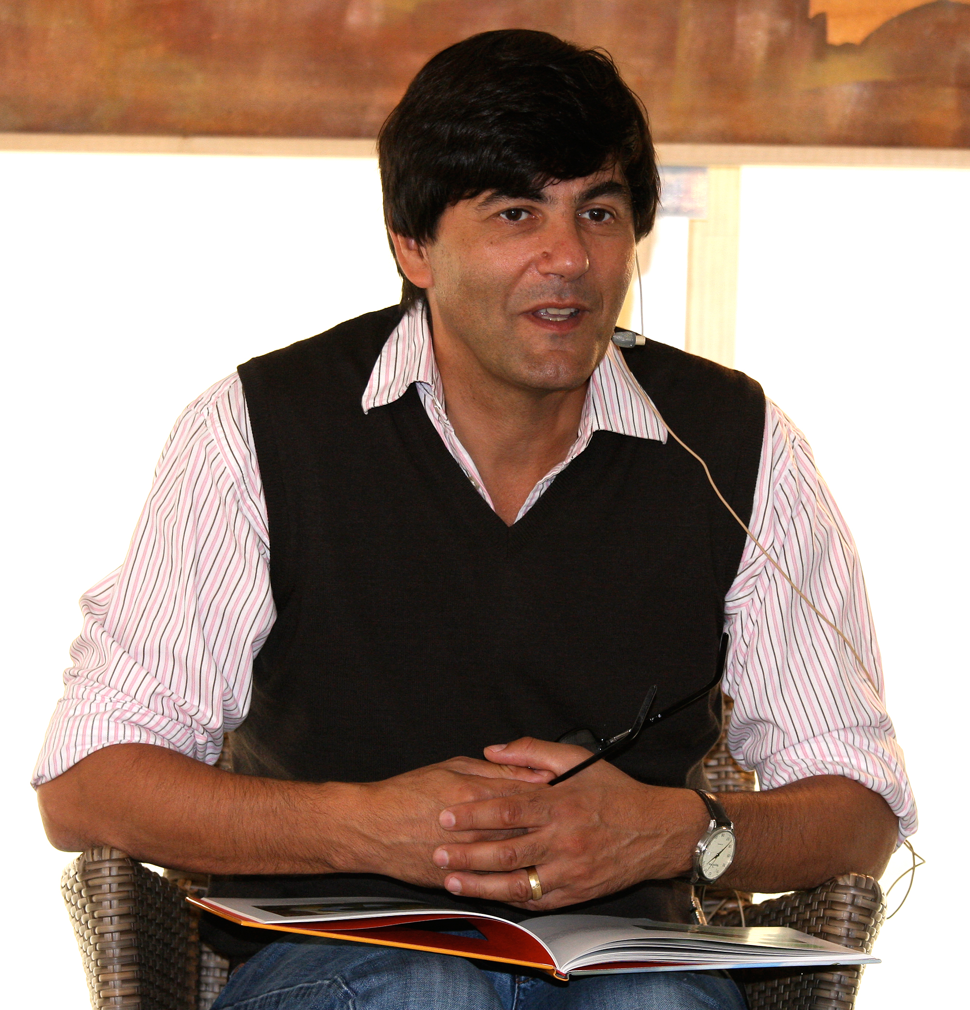 Mario Giordano, deutscher Schriftsteller, bei einer Lesung in Köln